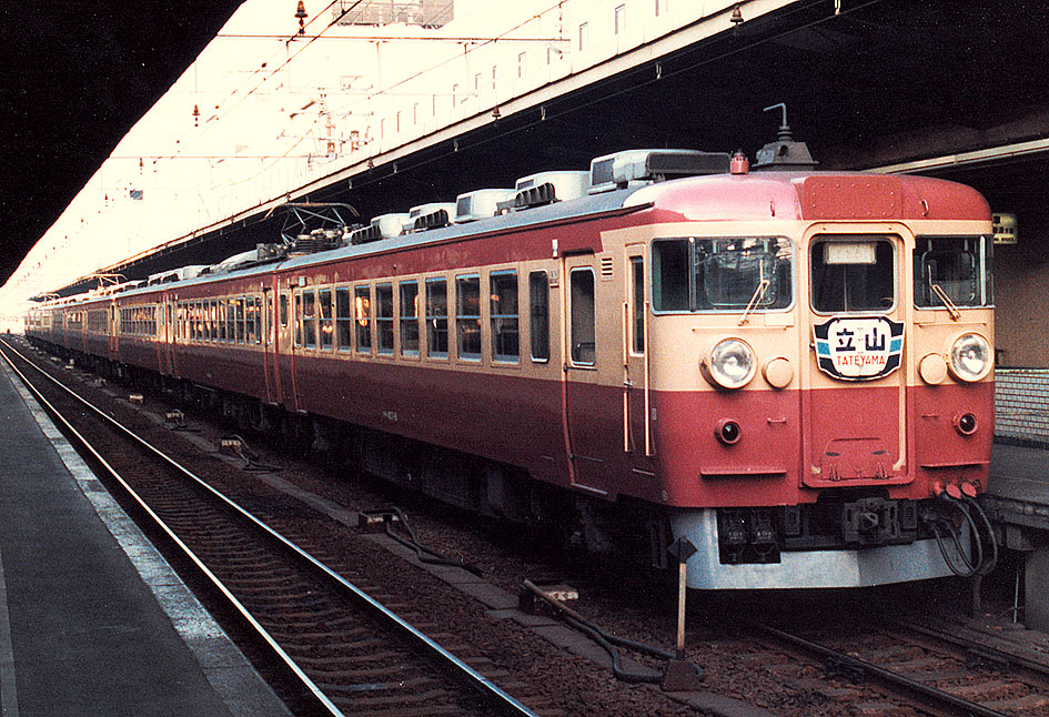 国鉄 475系急行形電車 急行「立山」